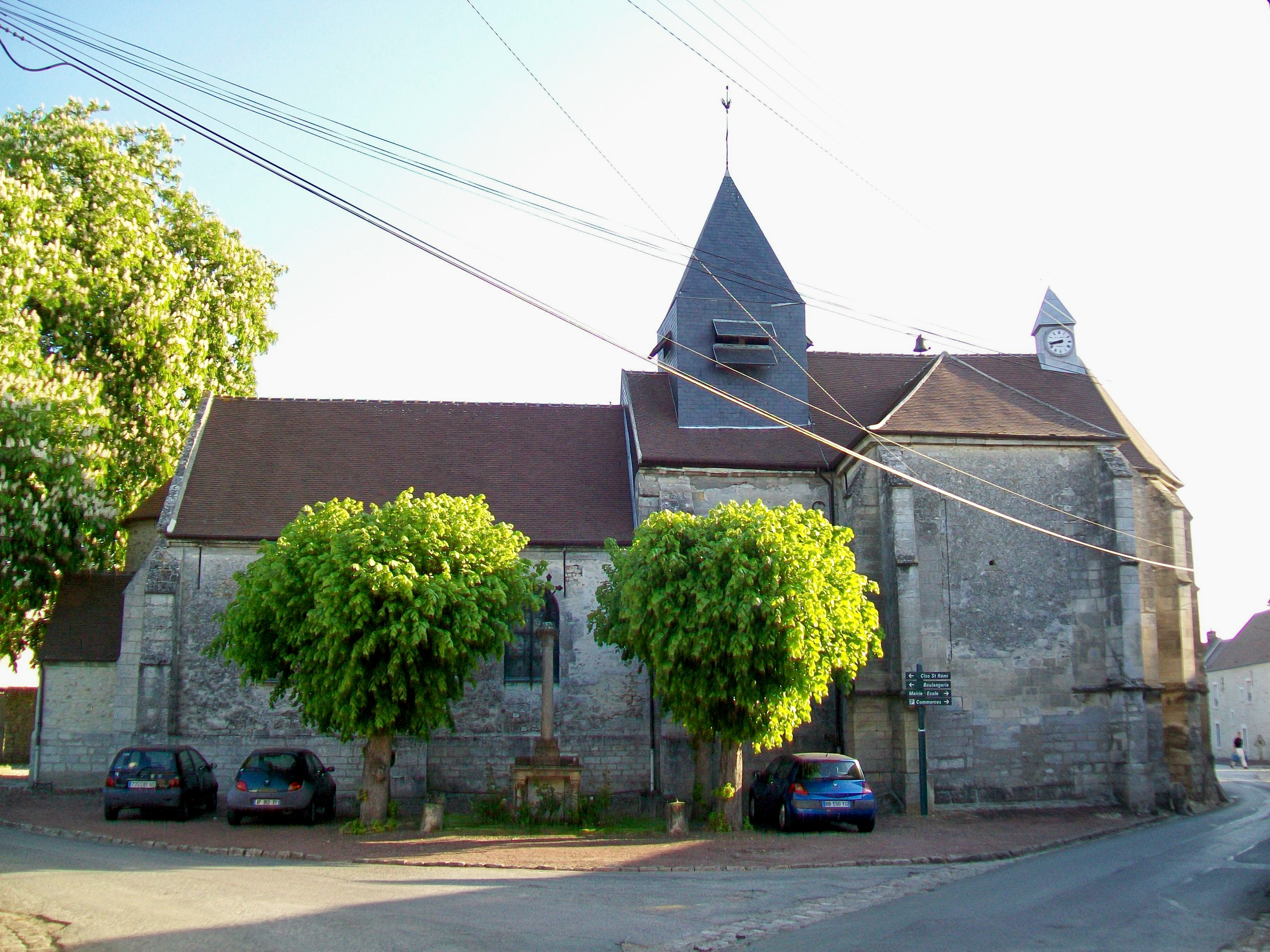 La façade sud de l'église Saint-Rémi : elle ne comporte qu'un petit clocher en charpente. Le bâtiment de base date du XIIe siècle (la partie basse ainsi que la première travée du chœur) alors que le transept et le chœur sont des ajouts du XVe ou XVIe siècle.